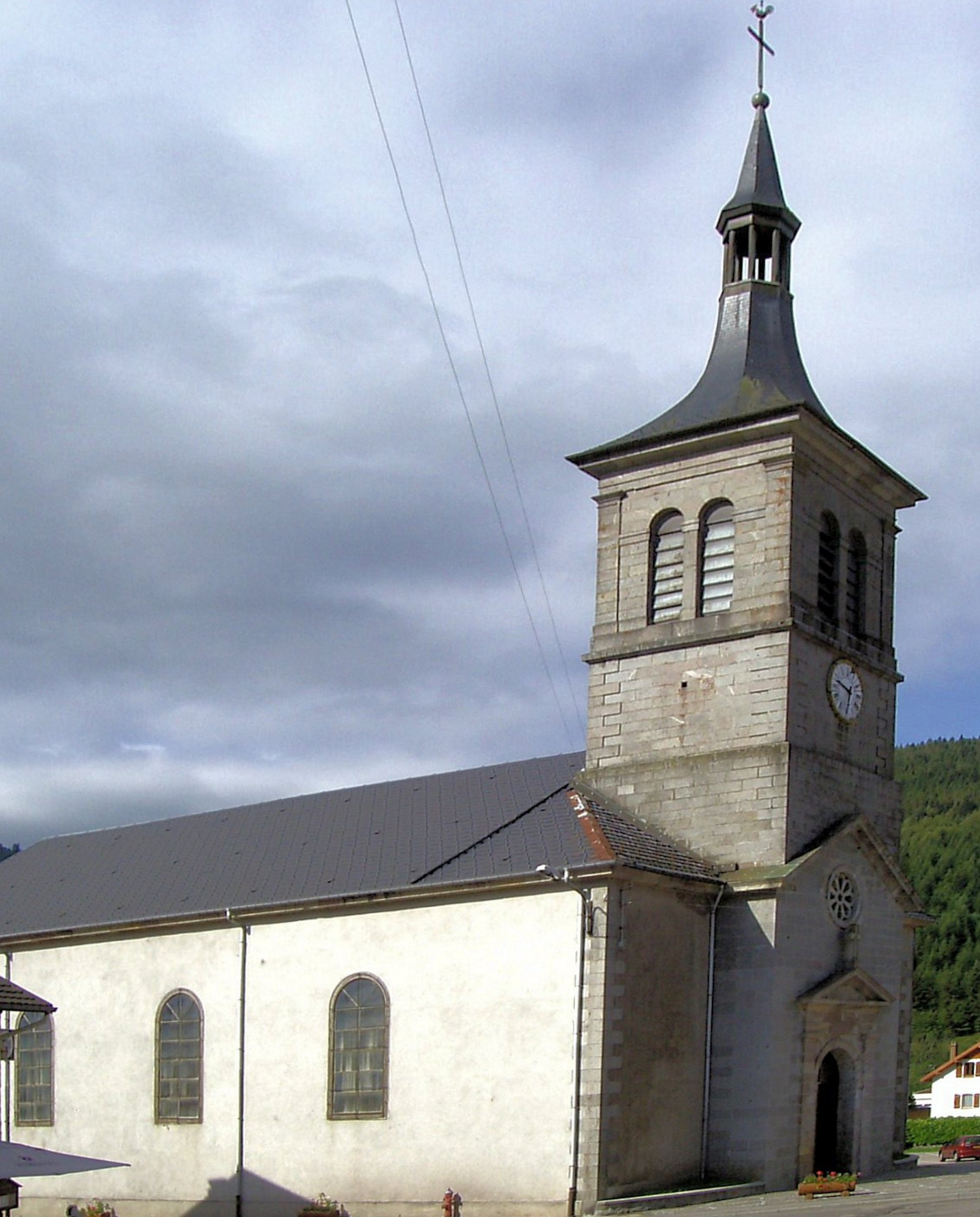 L'église Saint-Claude á Ventron